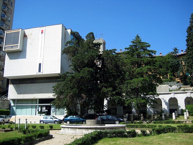 Muzej grada Rijeke u Rijeci